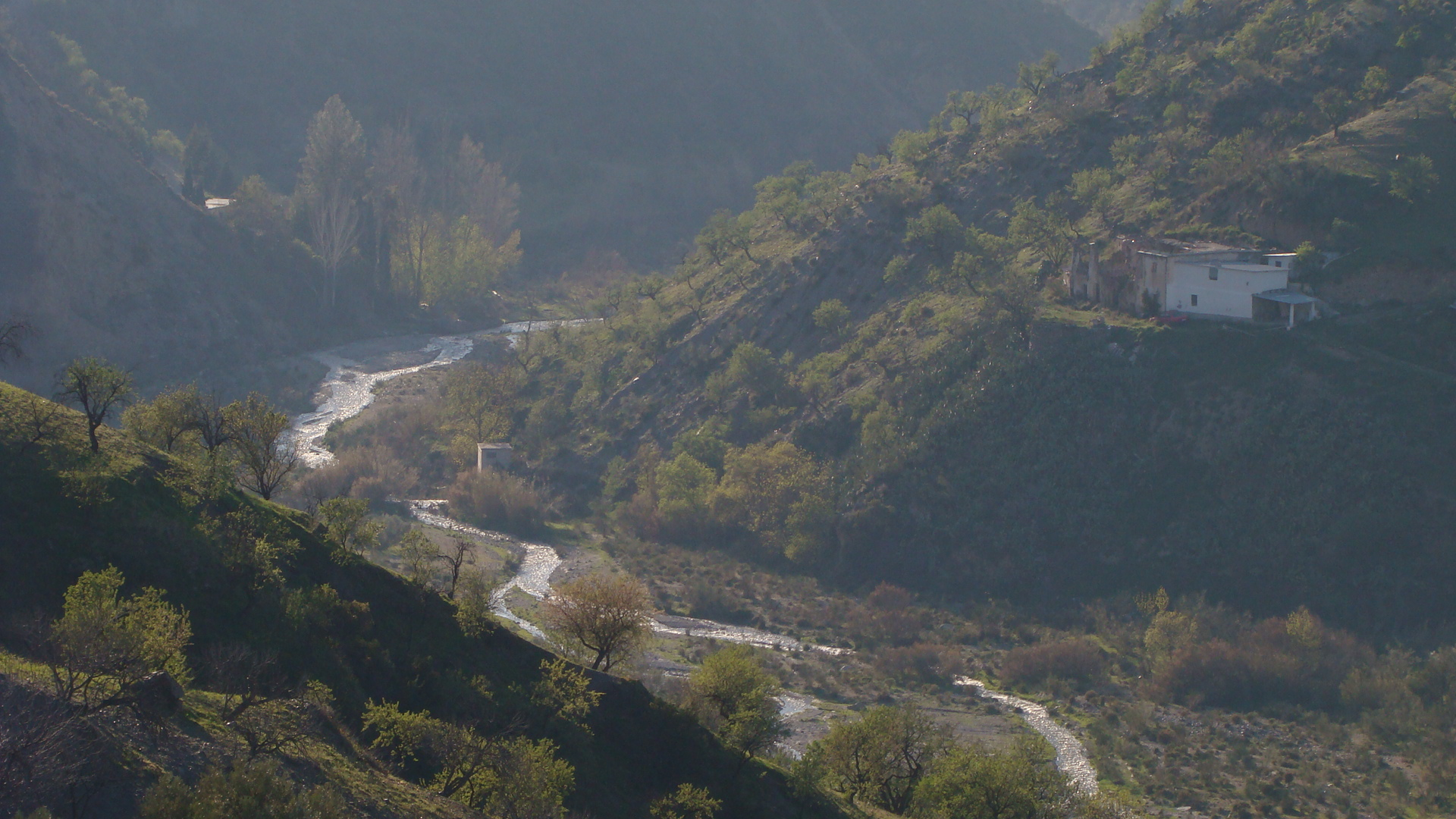 rio Guadalfeo, cuenca media